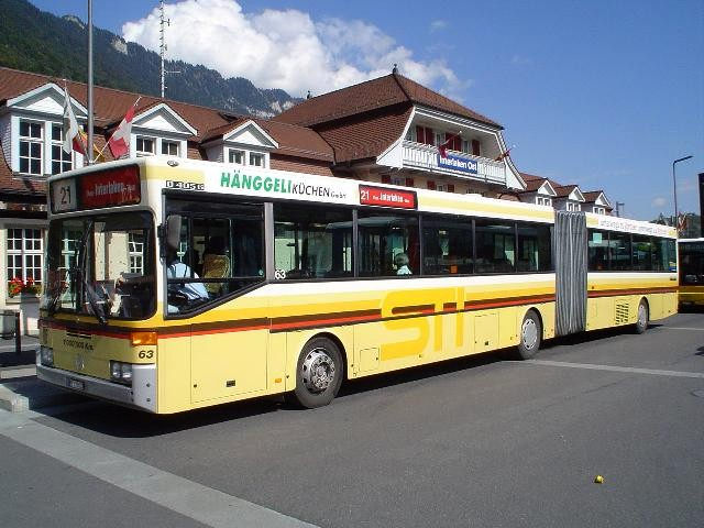 Mercedes Gelenkbus der Verkehrsbetriebe STI in Interlaken Ost im September 2005.